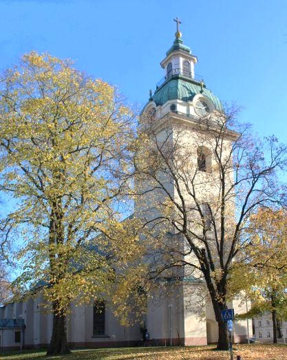 GÄVLE VÄSTER 31:1 - husnr 1, HELIGA TREFALDIGHETSKYRKAN